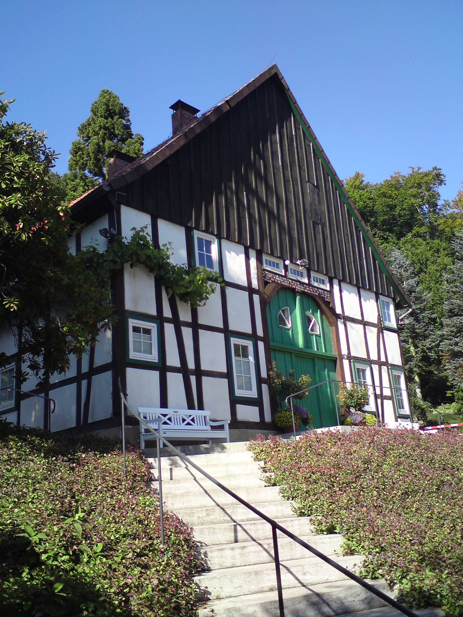 westfälisches Bauernhaus im Botanischen Garten Bielefeld